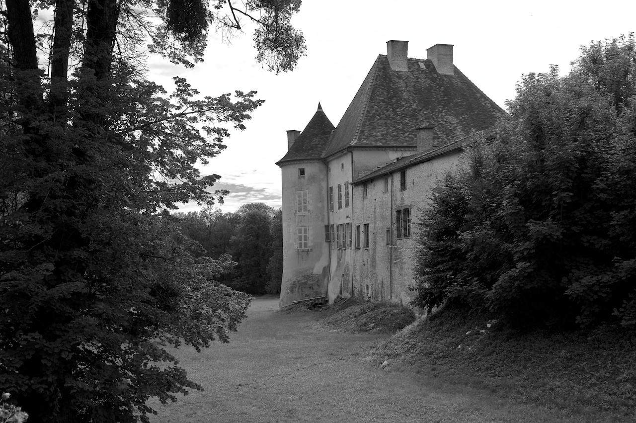 Château d'Arrentières (Aube, Champagne-Ardenne, France).